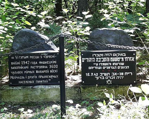 Памятник 3600 евреям из деревни Молчадь Барановичского района, убитым немецкими нацистами и полицаями в 1942 году. Памятник находится к юго-востоку от Молчади в урочище Поповские горы - в 100 метрах справа от дороги Р108 Молчадь - деревня Мицкевичи в направлении на Барановичи на 35-м километре (имеется знак на обочине). В июле 2012 года снесен и на его месте установлен новый памятник.